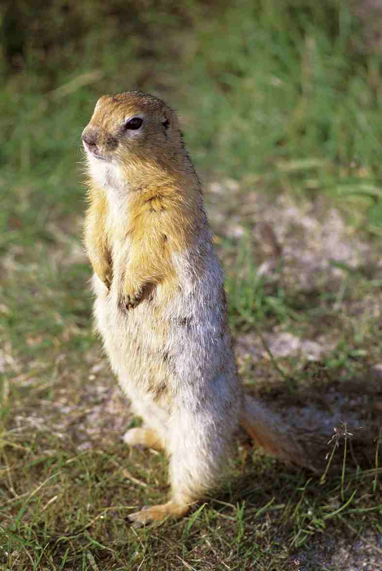 Arktisches Erdhörnchen (Inuktitut: Siksik; Spermophilus parryii)